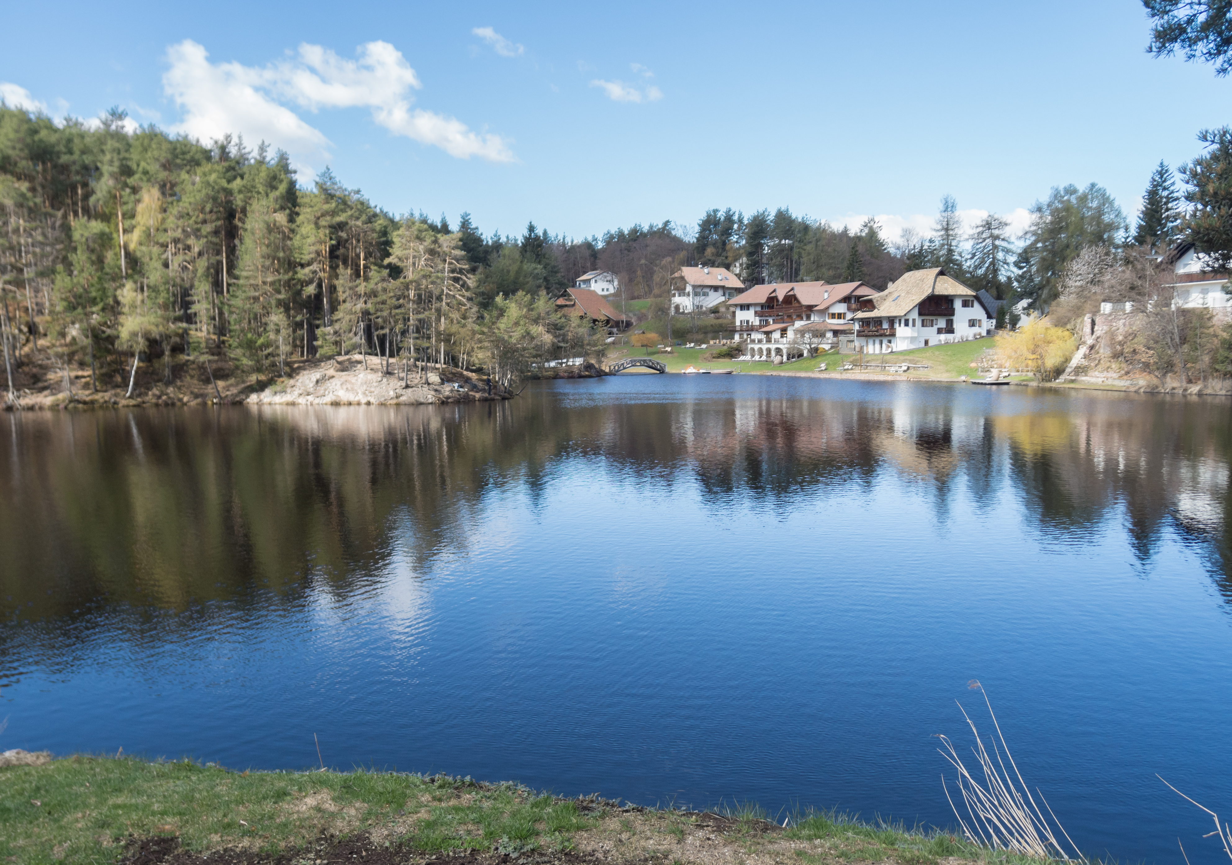 Der nordwestliche Teil des Wolfsgrubner Sees